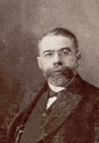 Iwan Filewicz, rosyjski historyk i publicysta